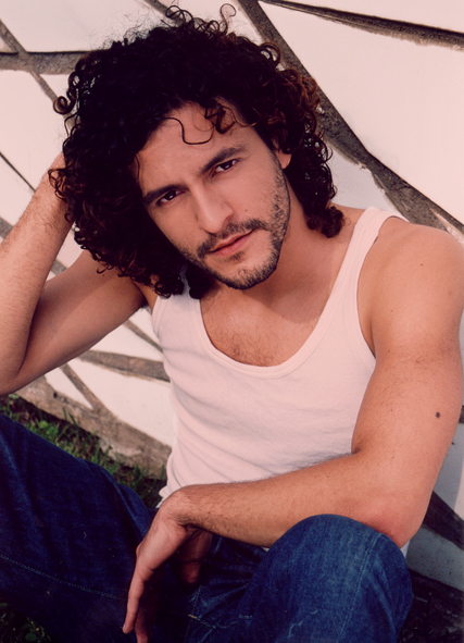 Isak Férriz